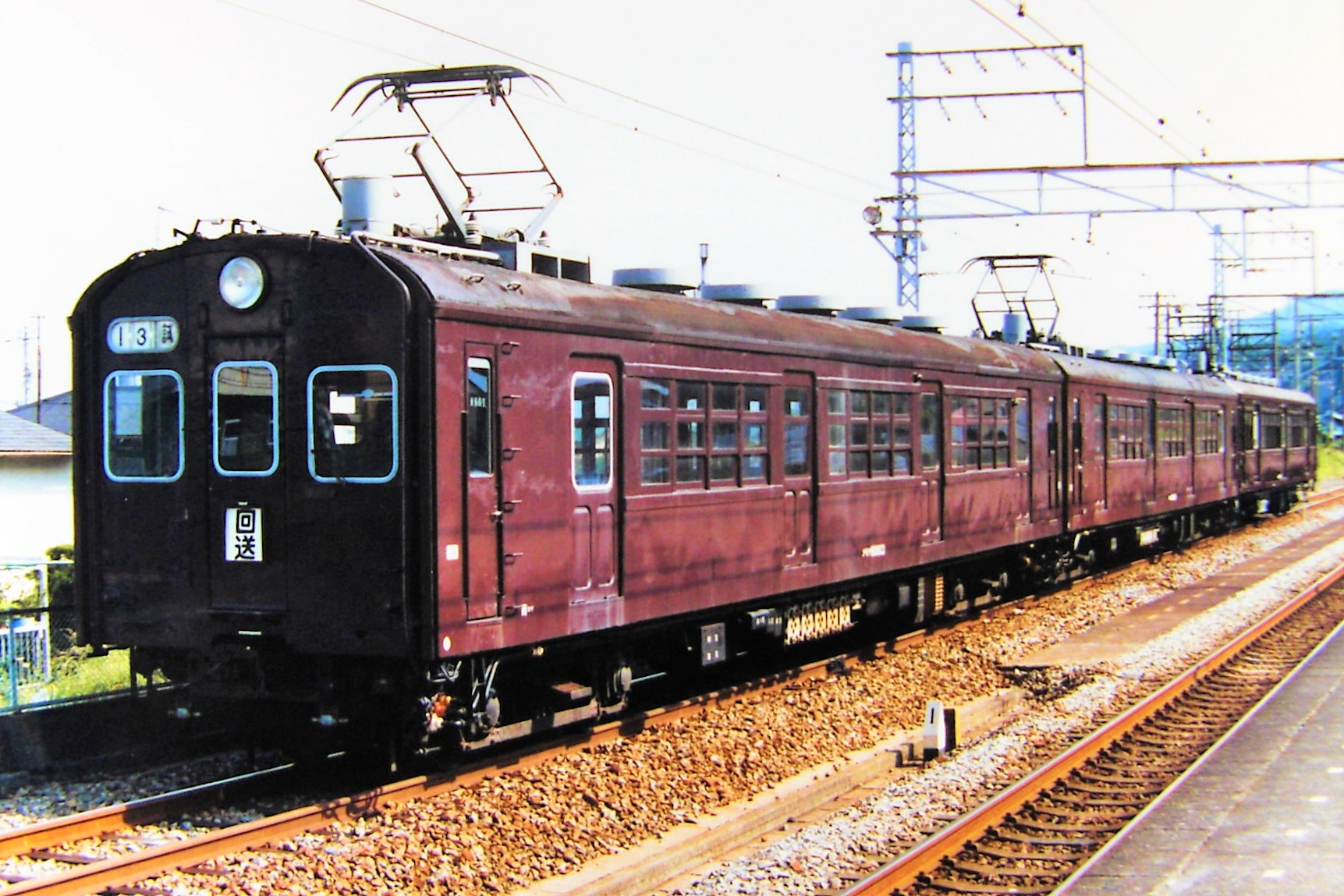 国鉄クモヤ90形電車 90013+90009